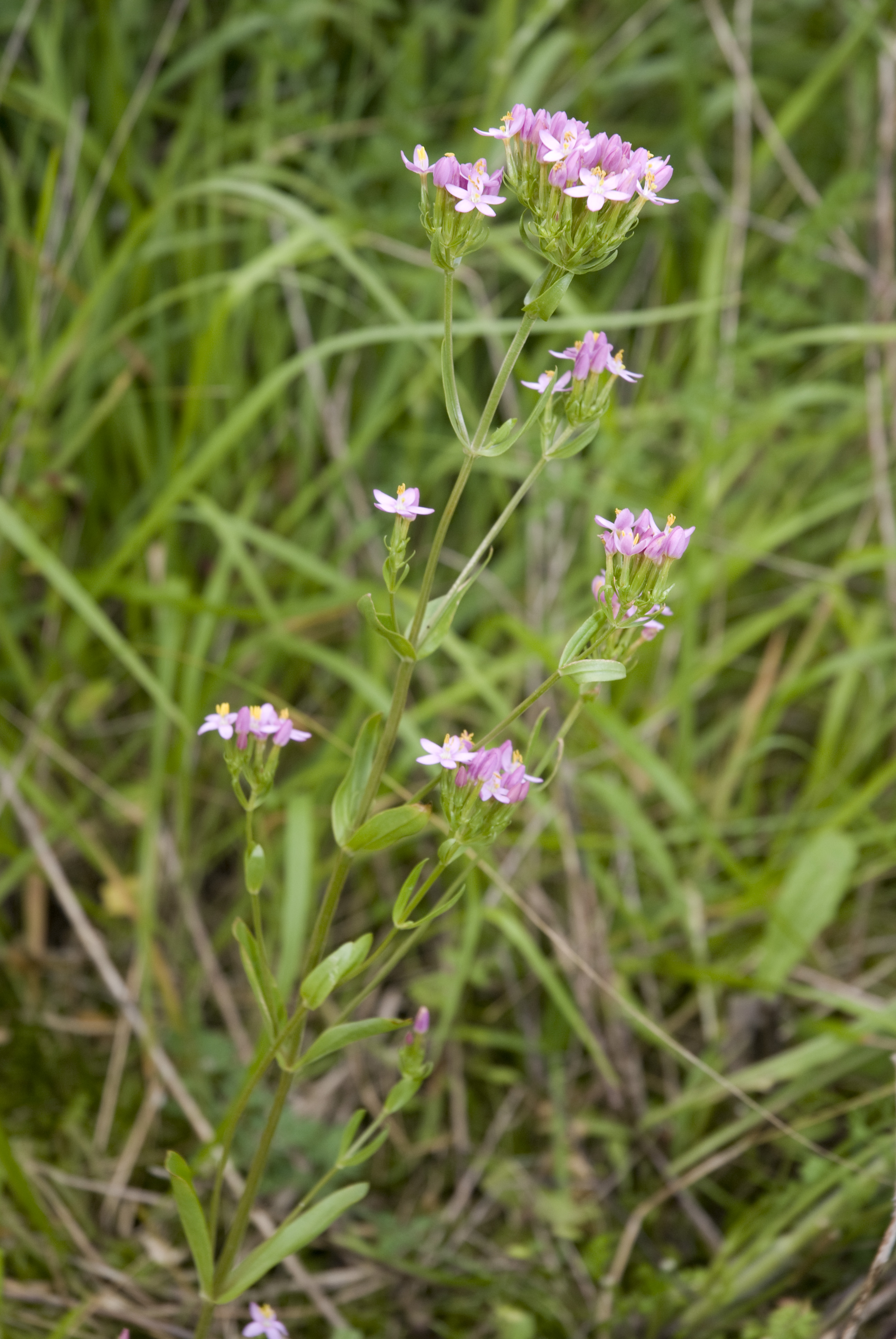 Centaurium erythraea Coteau de Chartèves (Aisne), France